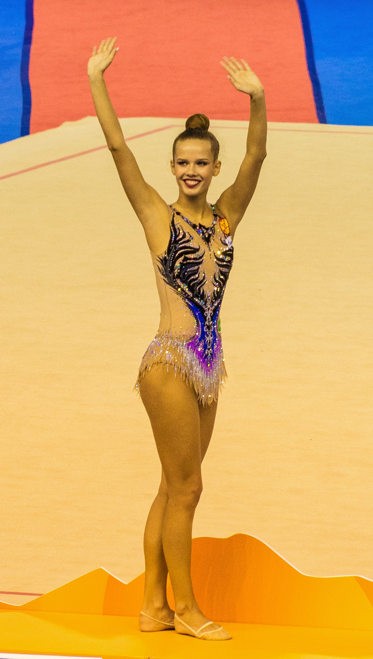 2017 Taipei Summer Universiade